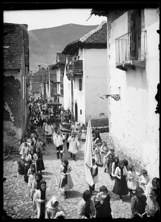 Imatge